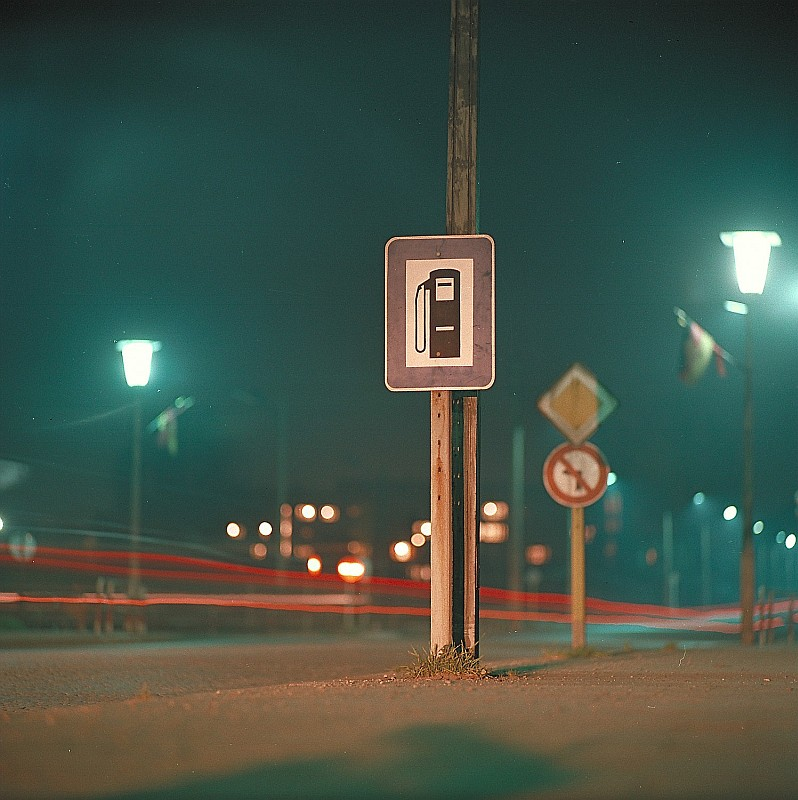 Original image description from the Deutsche Fotothek Verkehrsschilder